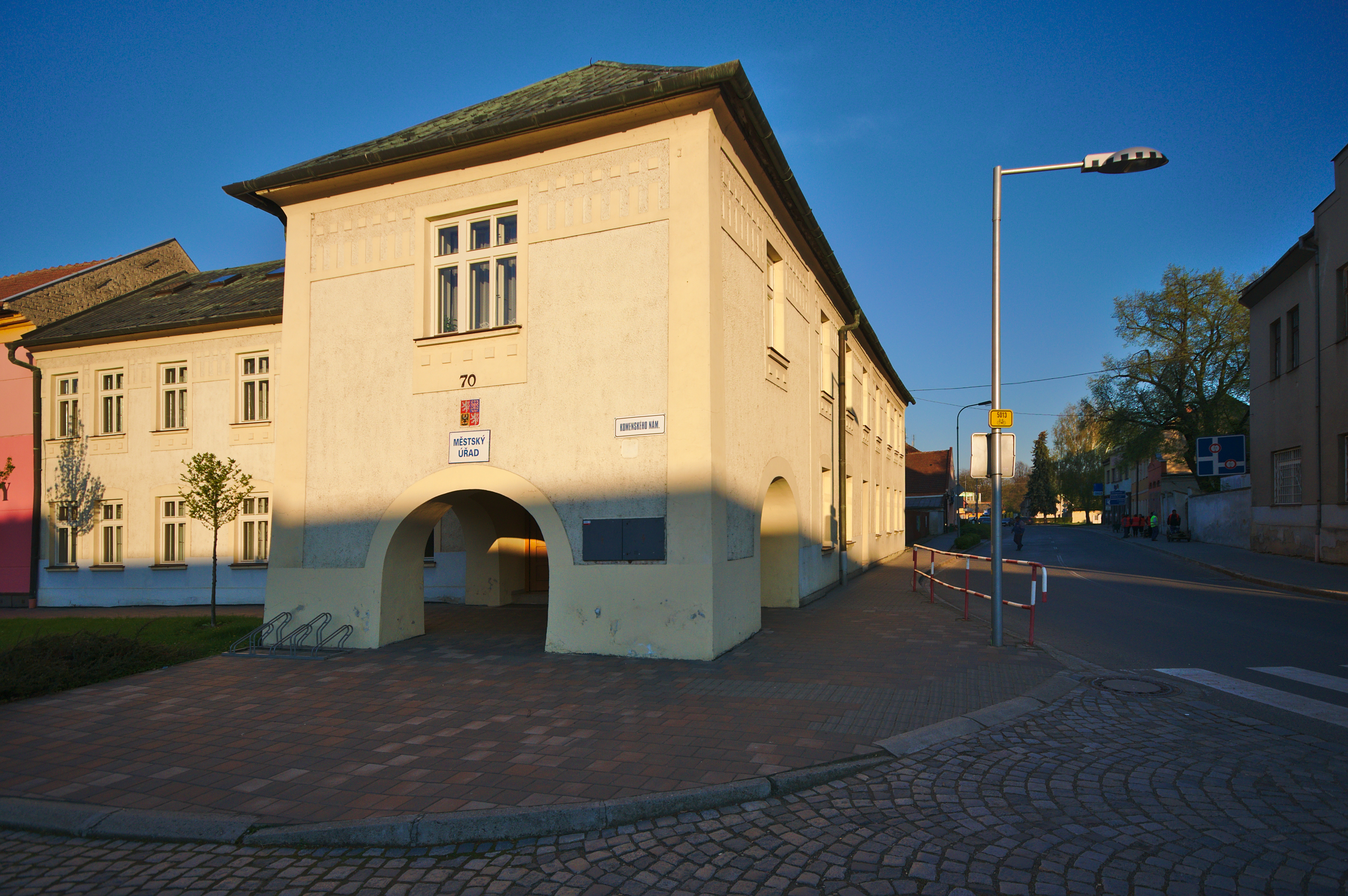 Městský úřad, Němčice nad Hanou, okres Prostějov